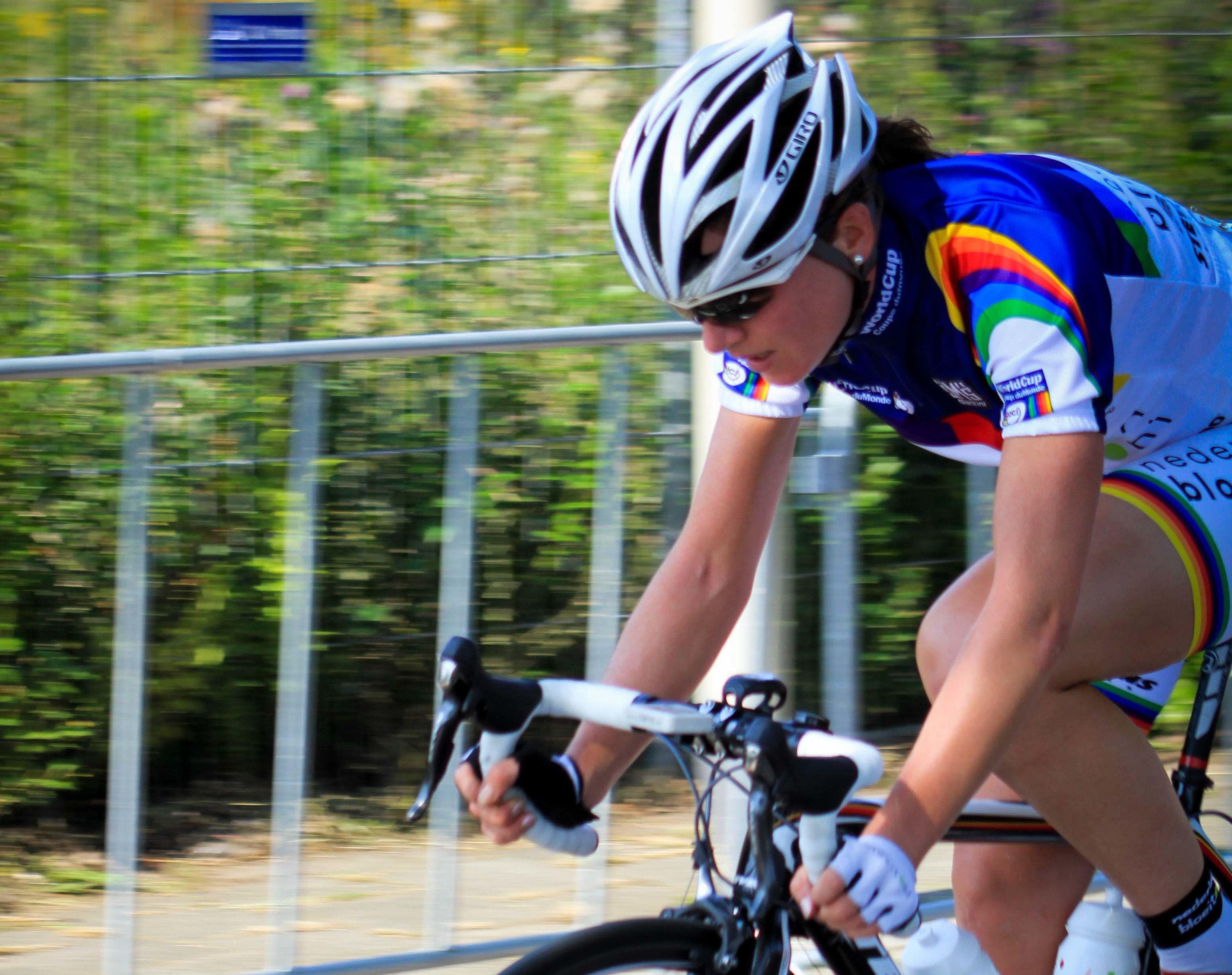 Annemiek van Vleuten Draai van de Kaai 2011